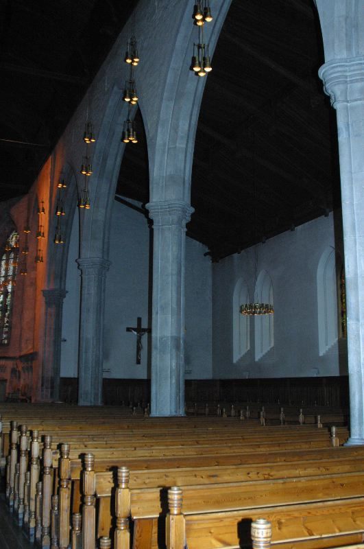 Domkirken i Bergen mot sideskipet. Foto: Nina Aldin Thune.